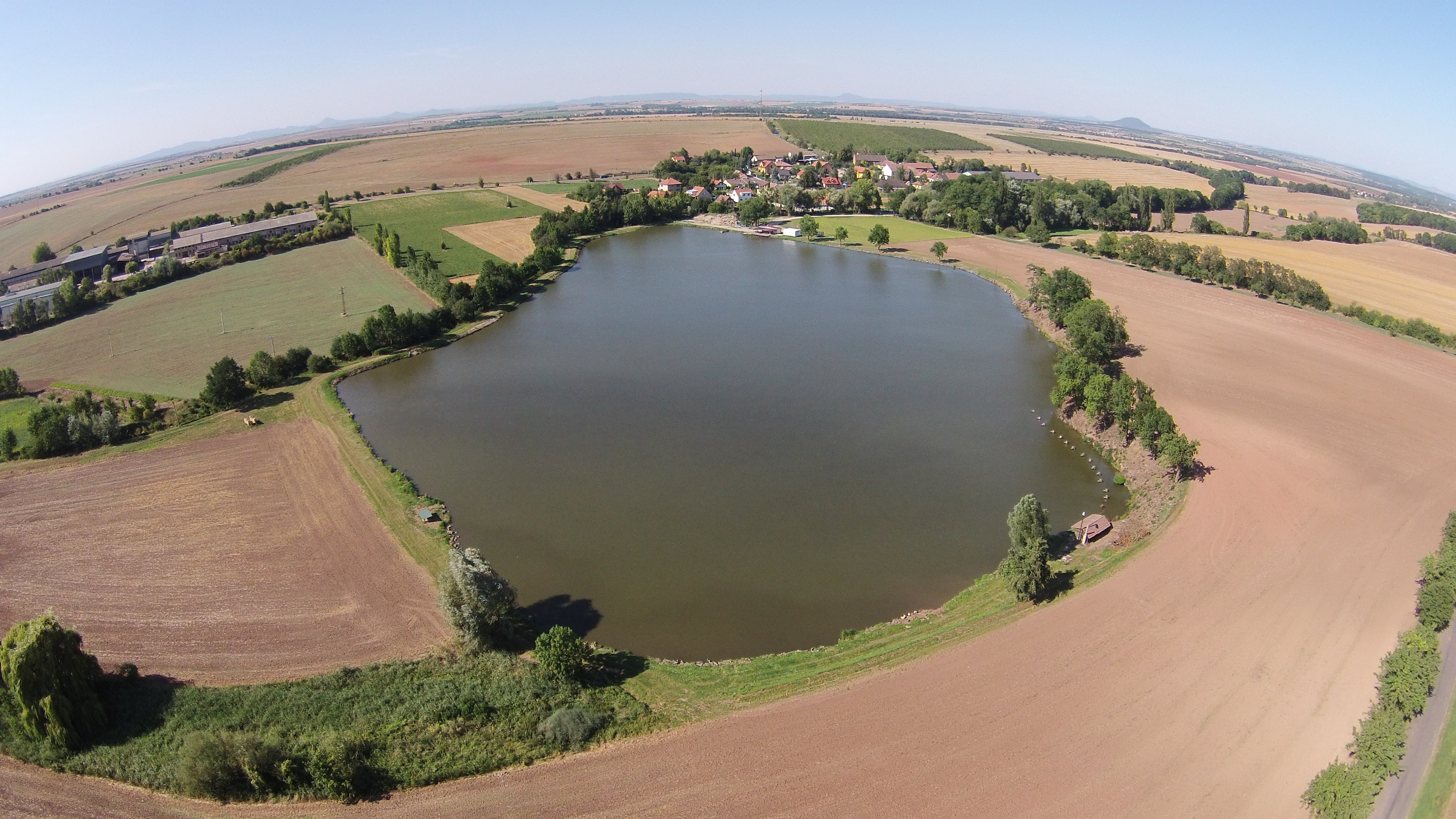 Žižický rybník, okres Kladno, Česká republika.